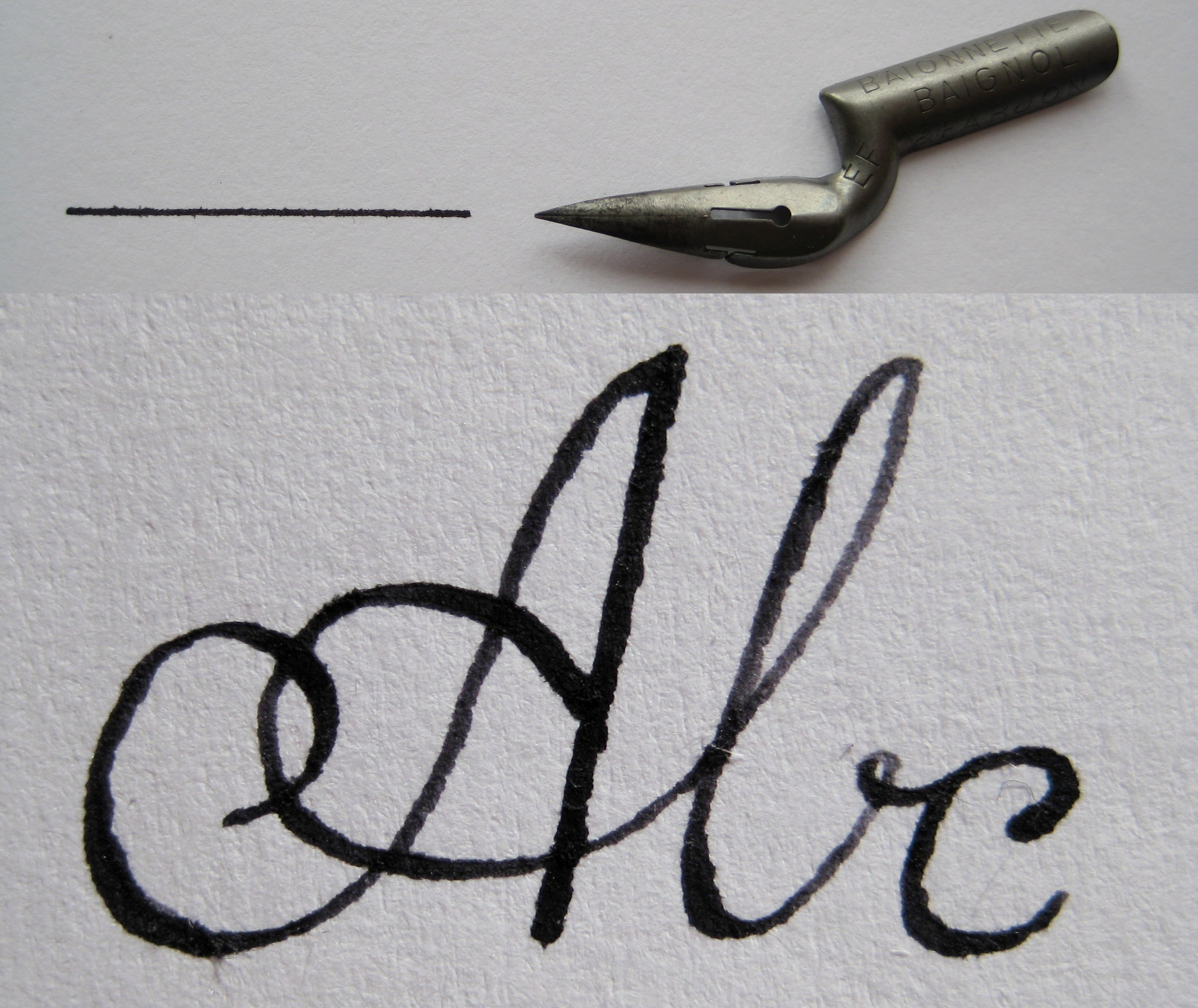 Ellenbogenfeder mit Strich und Schriftbeispiel